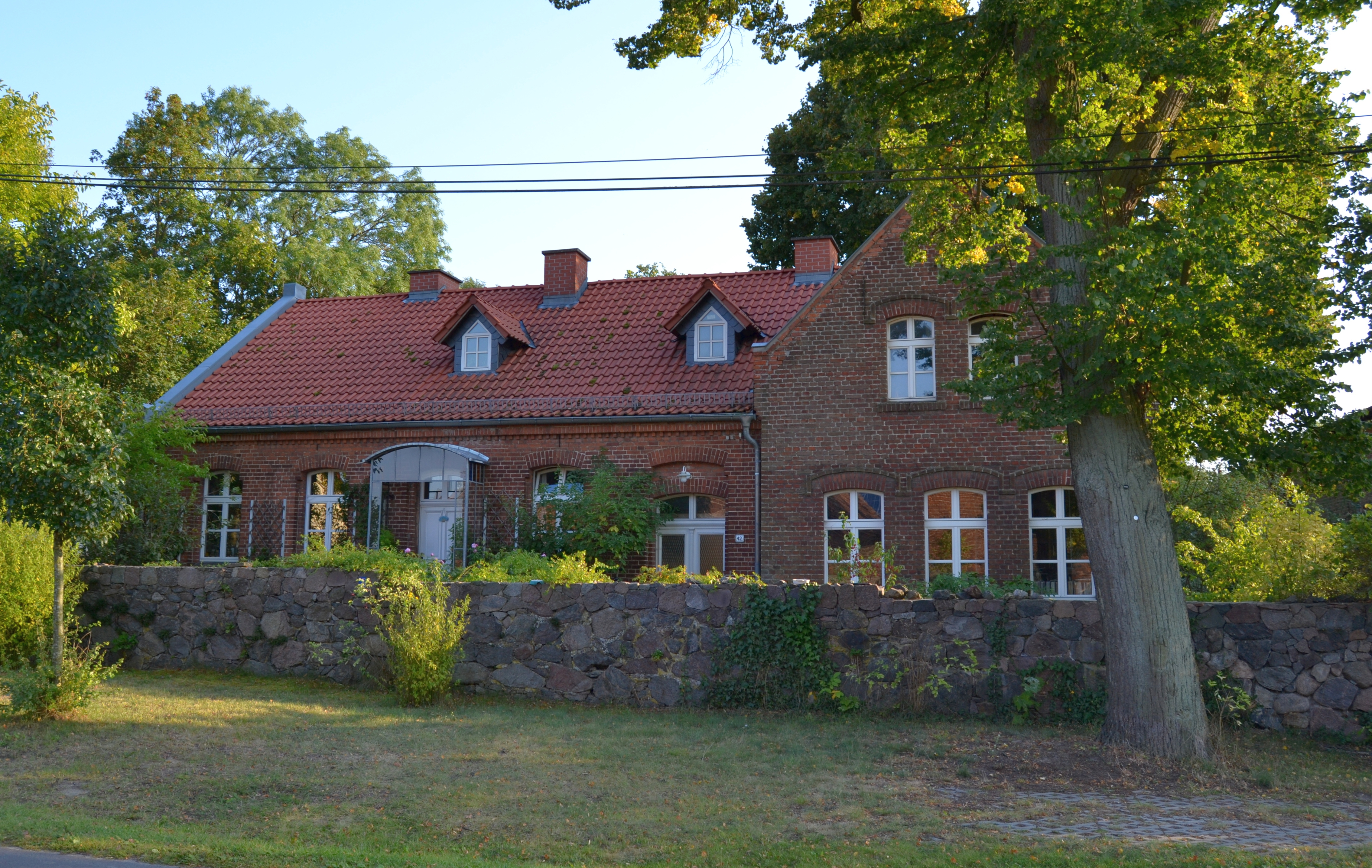 Baudenkmal Dorfkirche Werder (Rehfelde). Die evangelische Kirche wurde Mitte des 13. Jahrhunderts erbaut.. Fotoprojekt – Zwischen Berlin und Oder 2014 Photo project “Between Berlin and River Oder 2014”